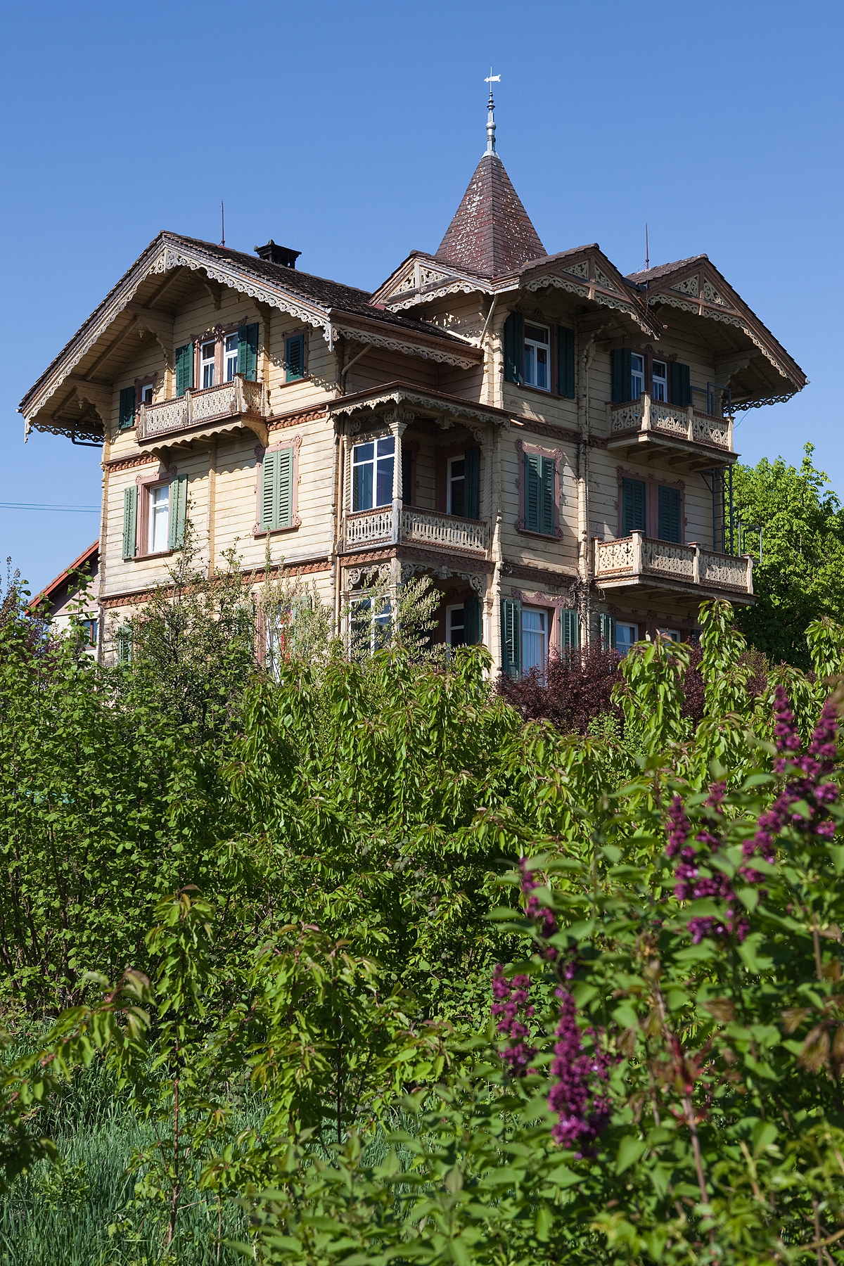 Pümpin-Haus in Gelterkinden (BL); errichtet 1896 vom Architekten und Bildhauer Isidor Raphael Pellegrini (1871–1954) für den Textilfabrikanten Ernst Handschin-Spiess